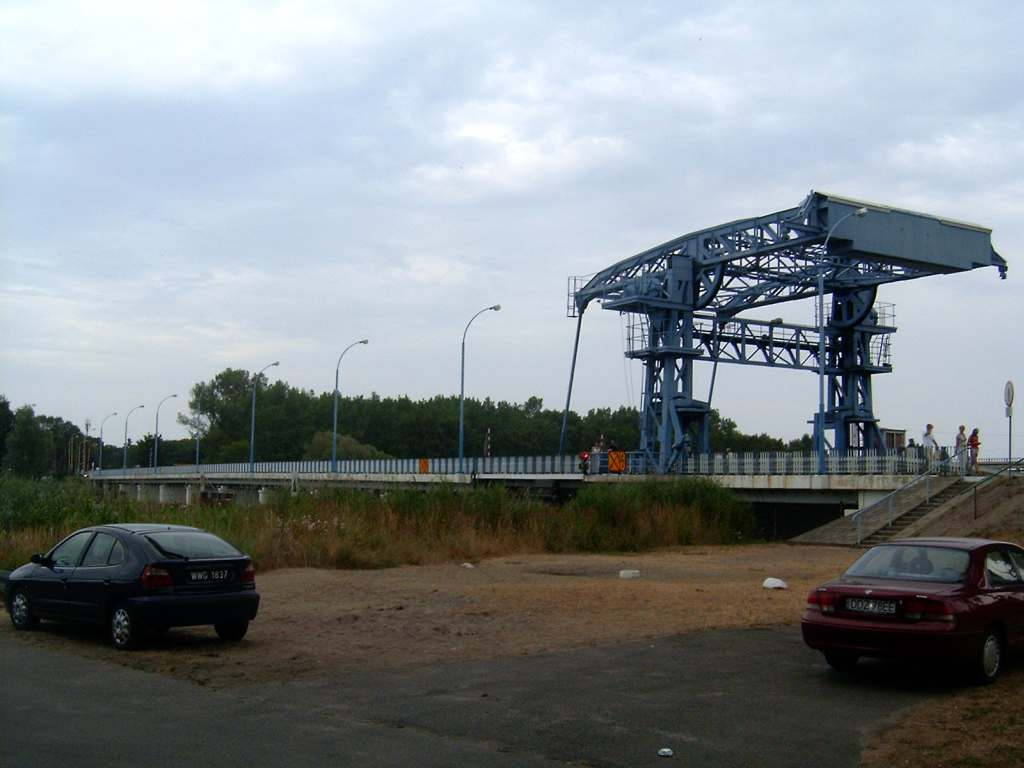 Dziwnów - most zwodzony